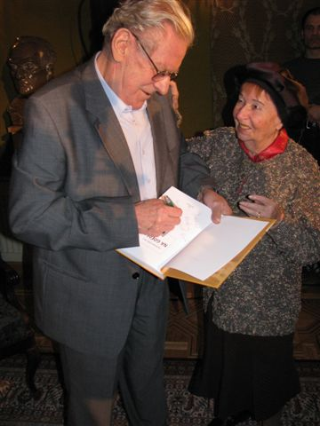 Wiesław Gołas (b. 1930), Polish actor and Irena Kwiatkowska (1912-2011), Polish actress